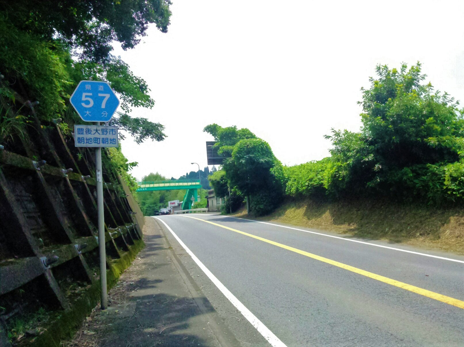 大分県道57号（国道57号からの転換路線）の下り線最初の案内標識（豊後大野市朝地町）